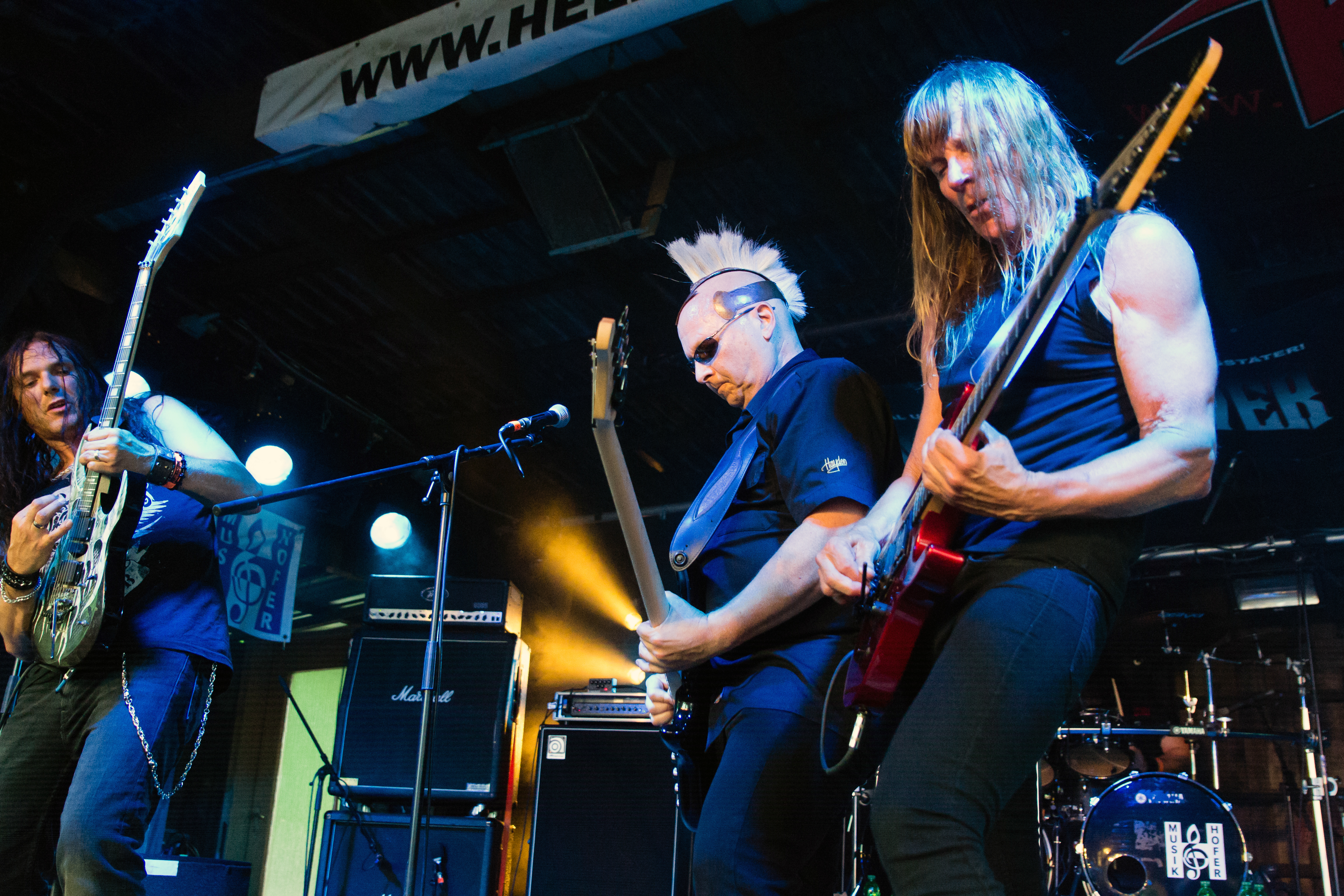 Q5 beim Headbangers Open Air 2016